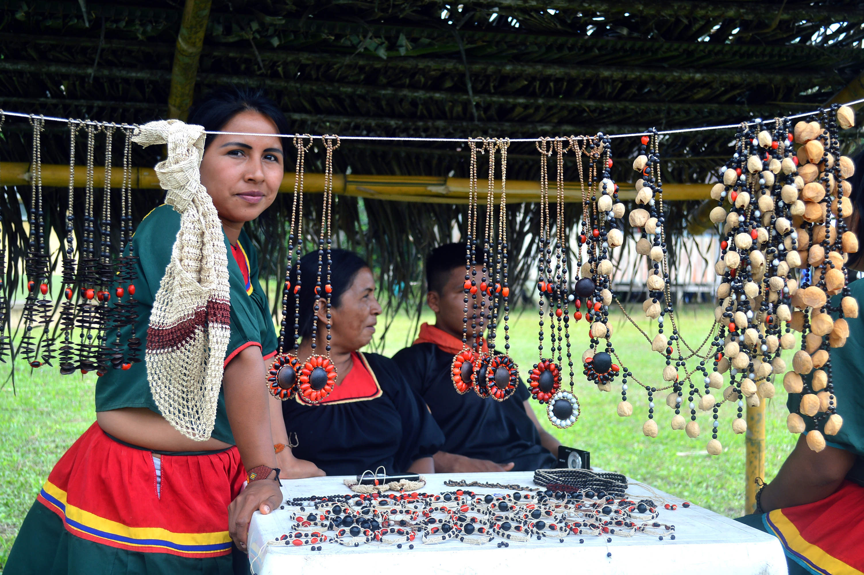 Sucumbíos, 11 abr (ANDES).- Comunidad cofán en la fiesta de la chonta. Visita a la laguna de la Perla, reserva de flora y fauna en Lago Agrio. Fotografías: Carlos Rodríguez/ANDES.